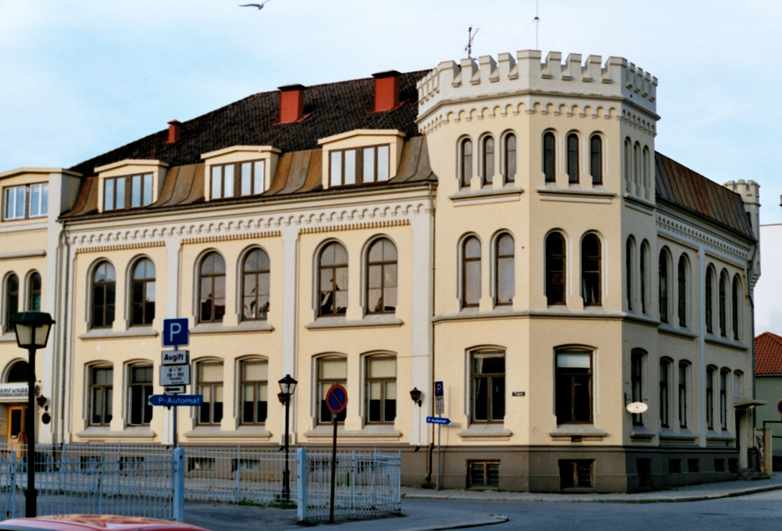 Tordenskjolds gate 3, Halden, Norway.